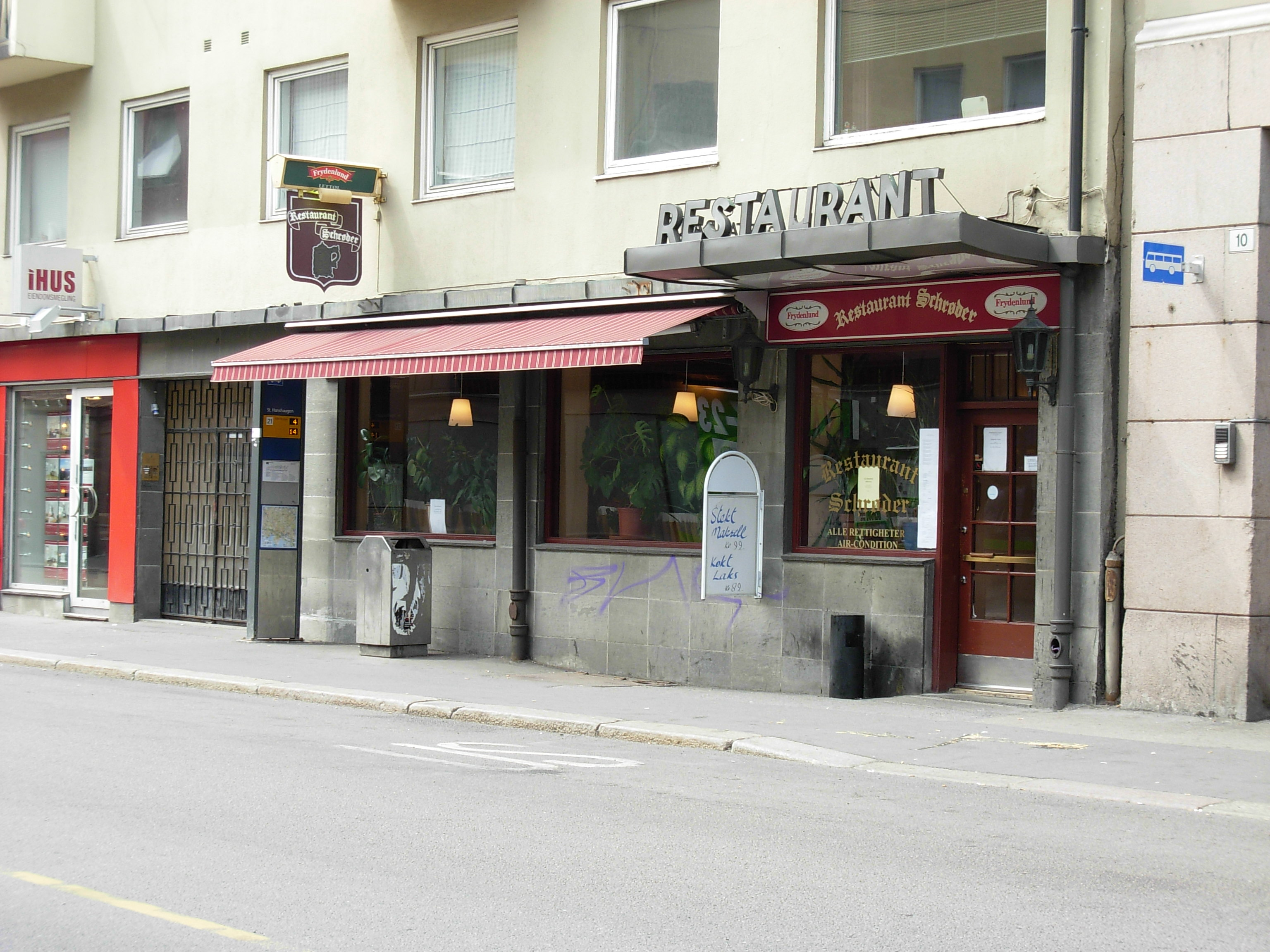 Restaurant Schrøder, St. Hanshaugen, Oslo, Norway [ [ [1]